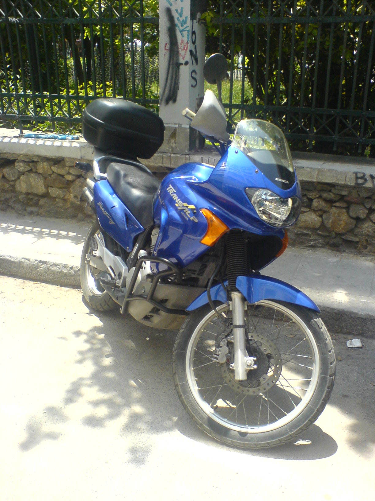 My Honda Transalp